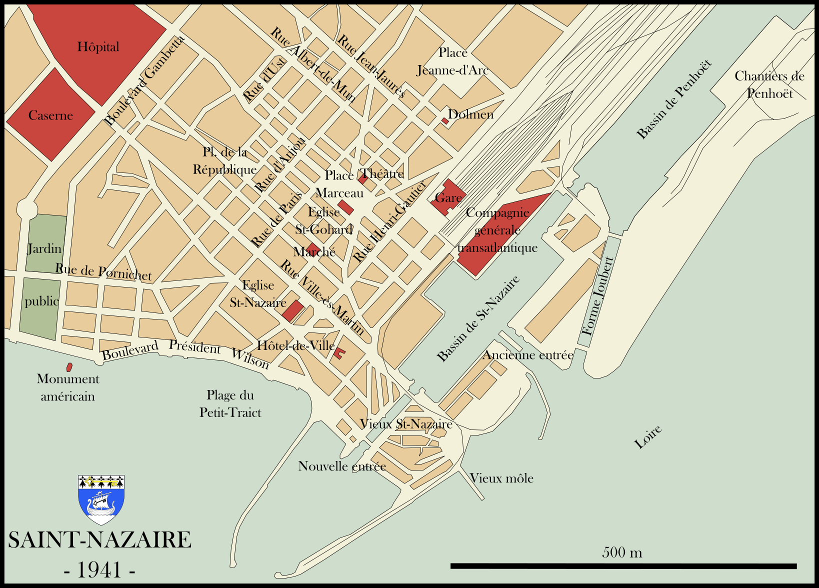 Centre-ville de Saint-Nazaire en 1941, d'après Stadtplan von Saint-Nazaire.